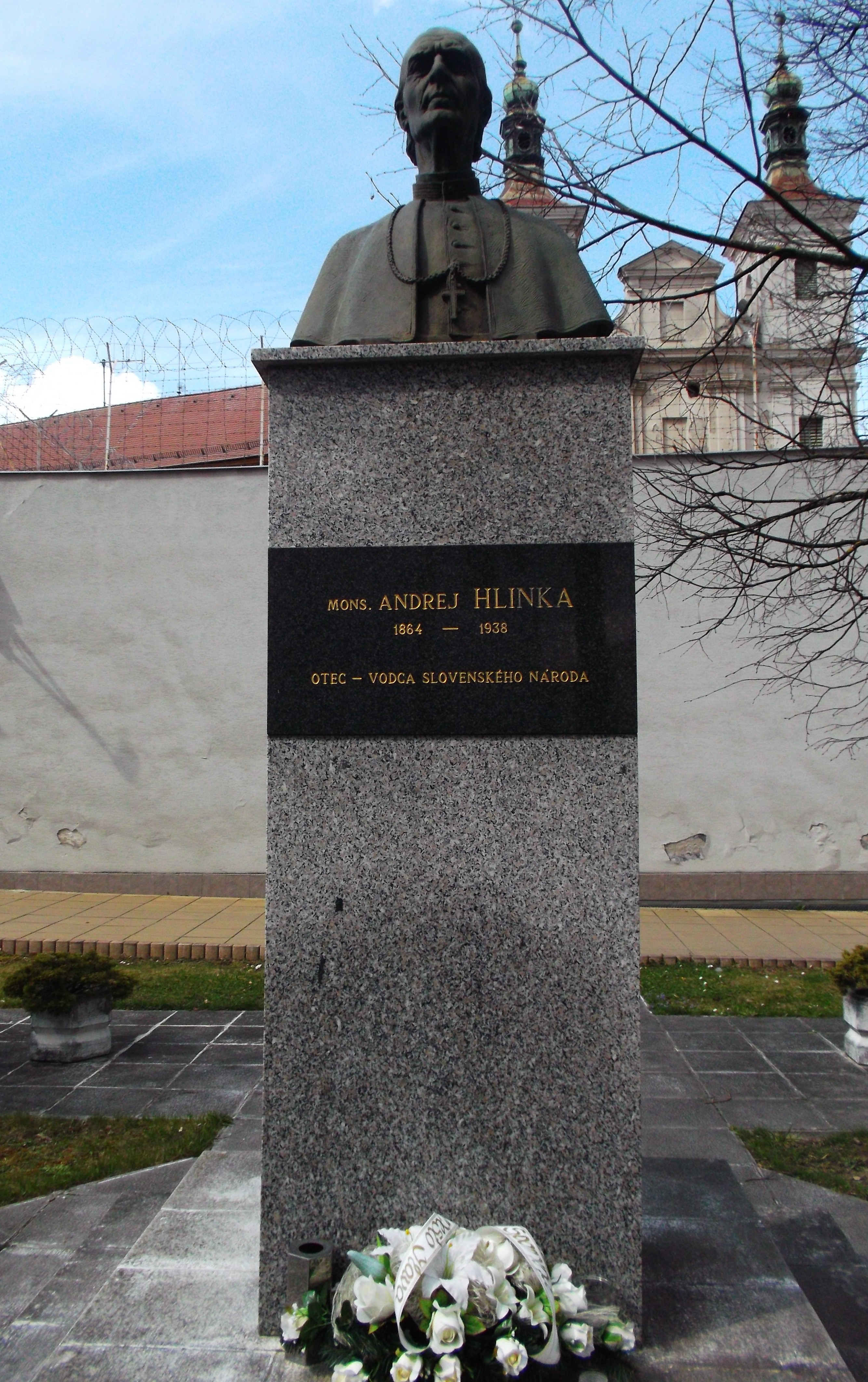 Pamätník Andreja Hlinku pred ilavskou väznicou